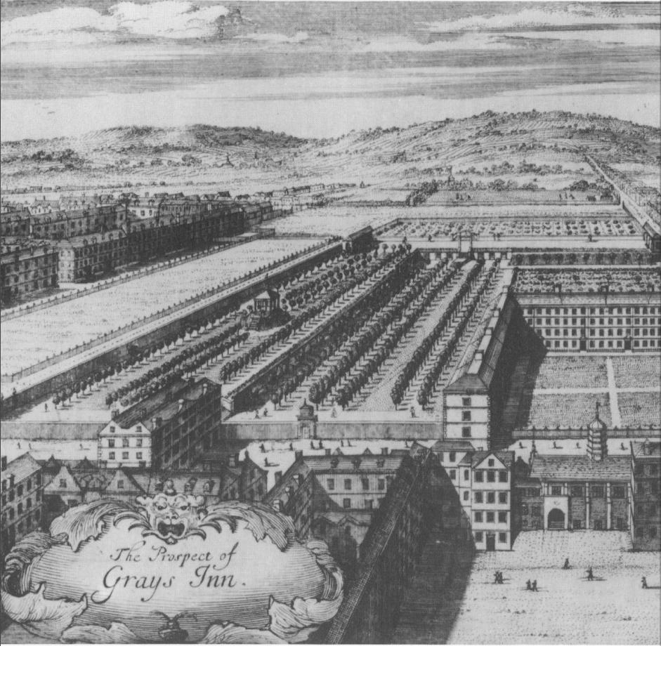 Sebuah imej Gray's Inn dari 1702 menunjukkan Walks.